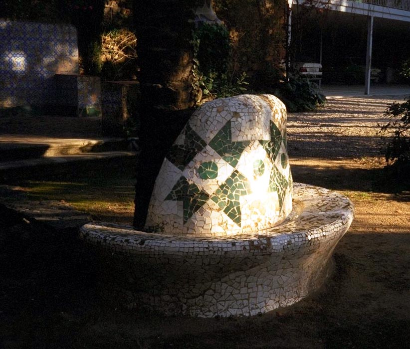 vue du jardin de Bellesguard Photographer Isabelle Grosjean ZA Date 1995-03 License GNU FDL Camera Minolta Dynax 500si